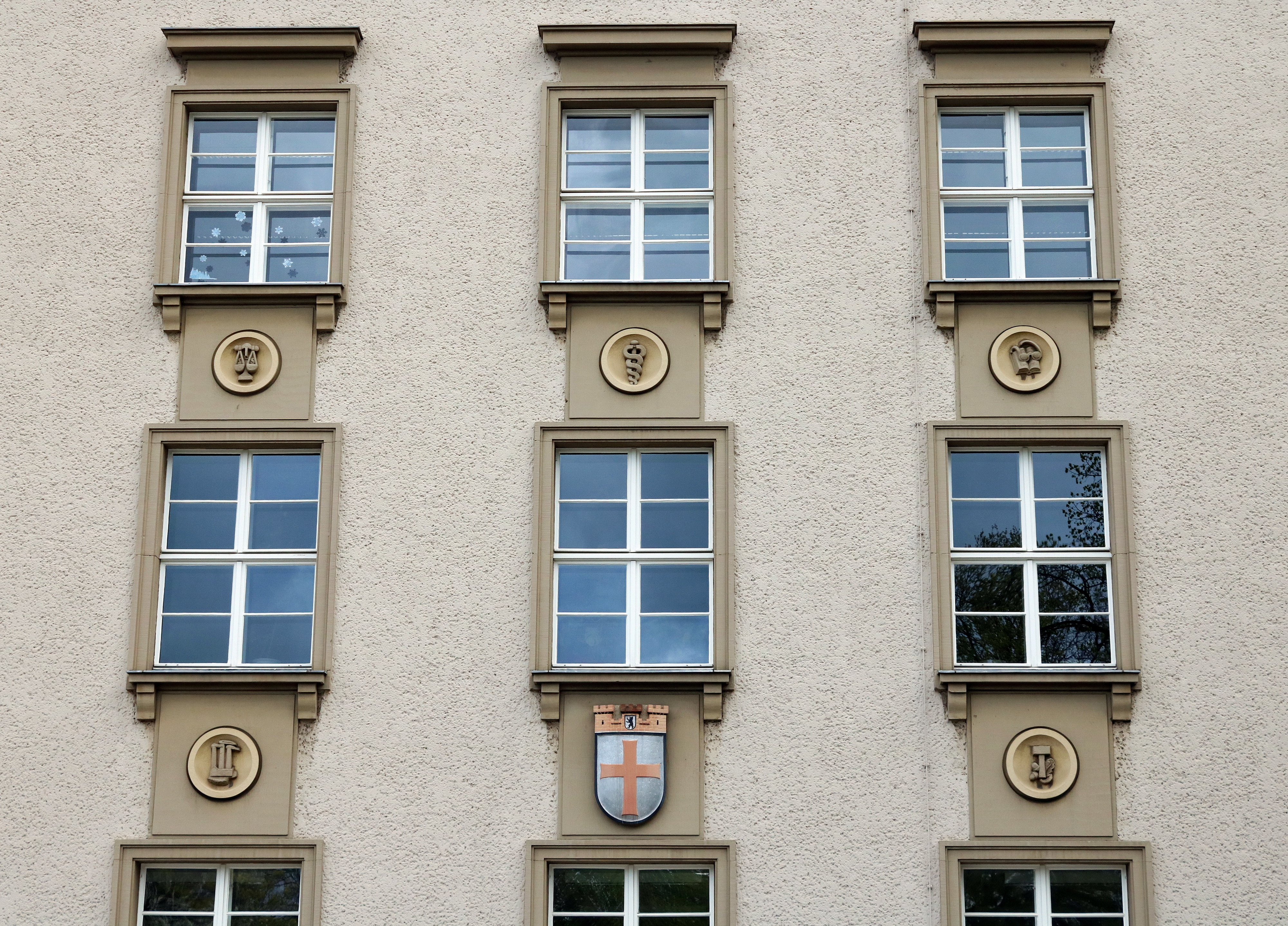 Rathaus Tempelhof - Wappen und Symbole am Haupttrakt